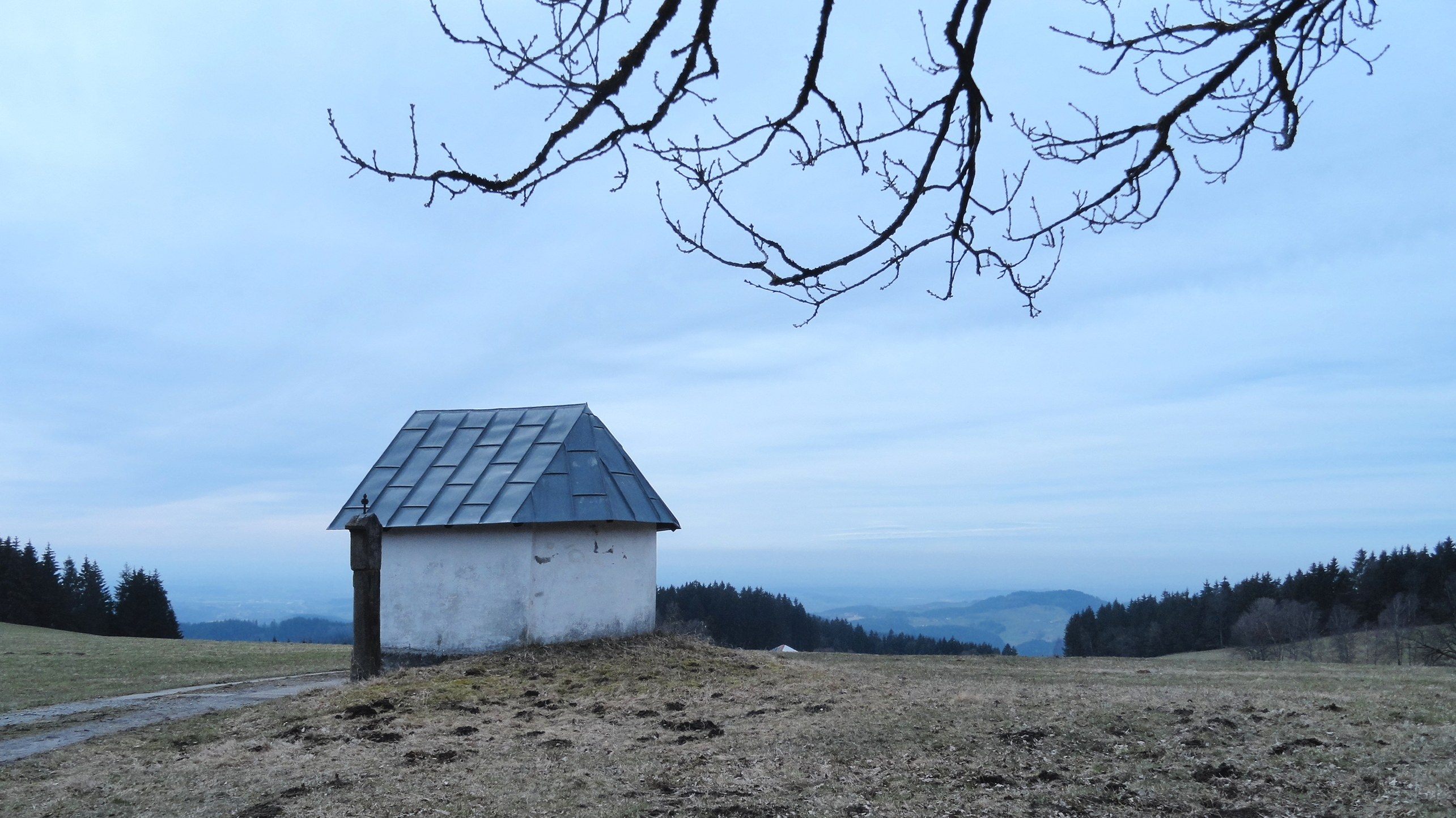 Kapelle Meinstorf mit Blick in den Gäuboden